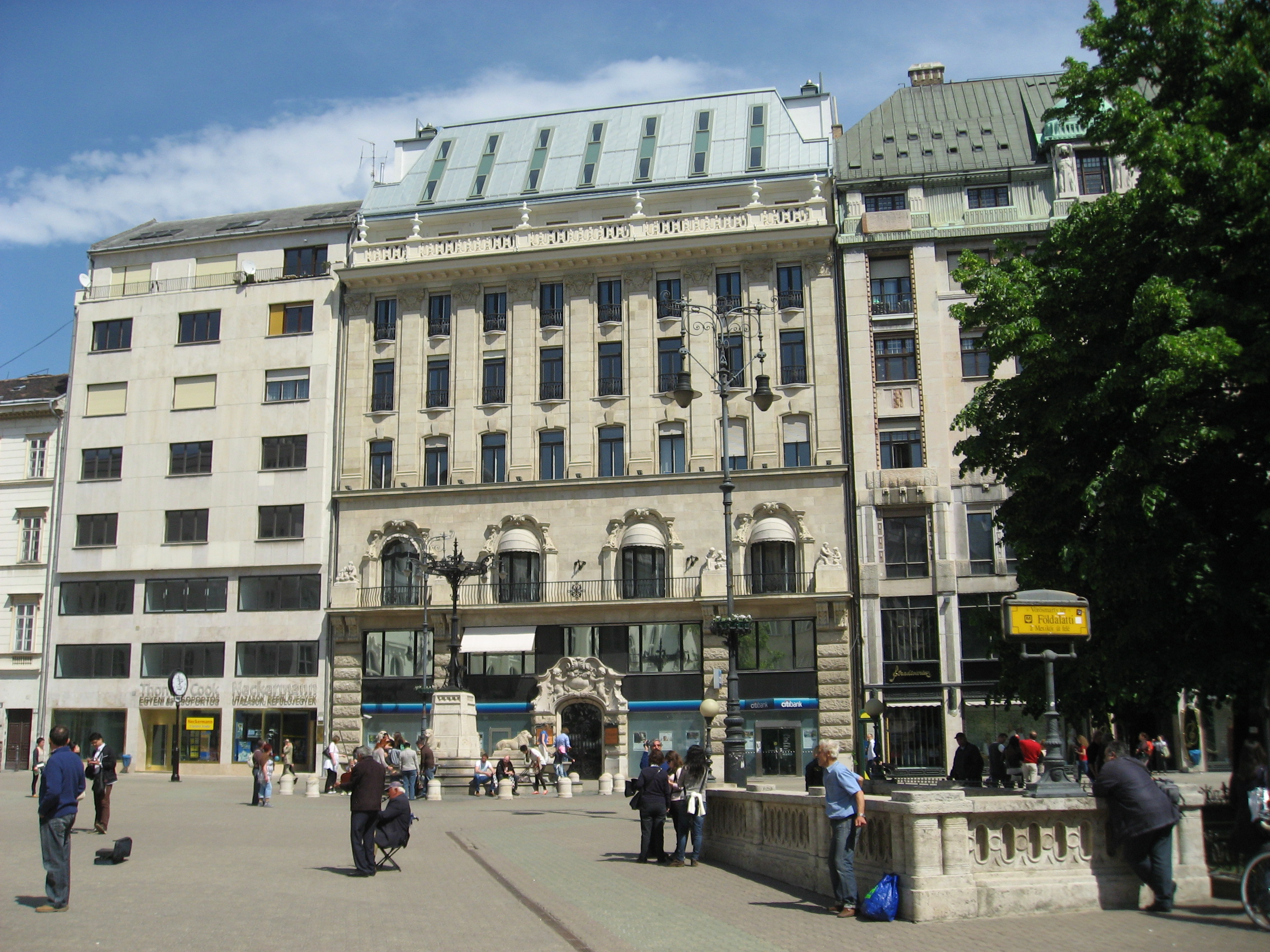 Budapešť